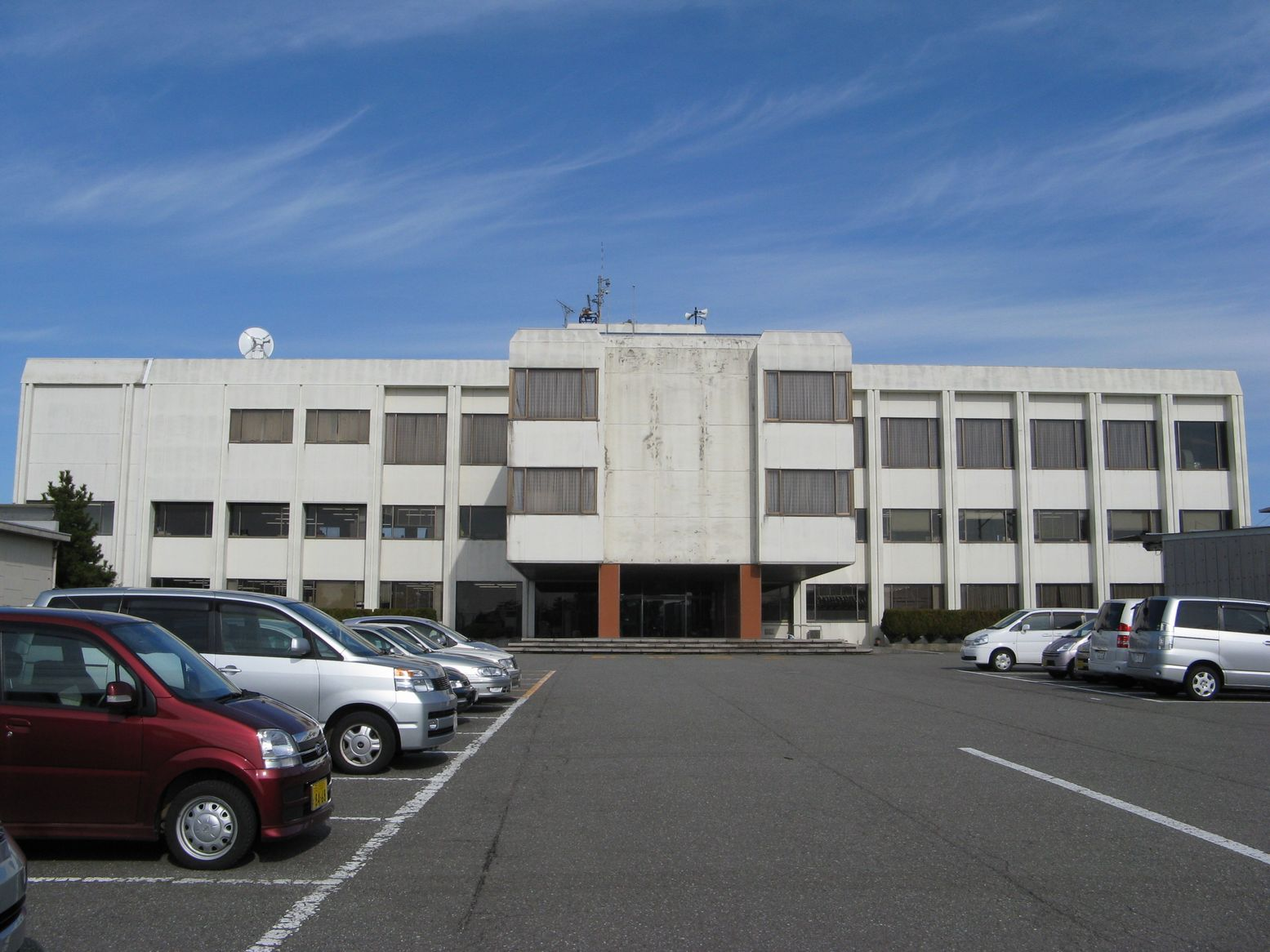 宝達志水町役場 押水庁舎（旧押水町役場） 2009年1月7日 Bakkai撮影